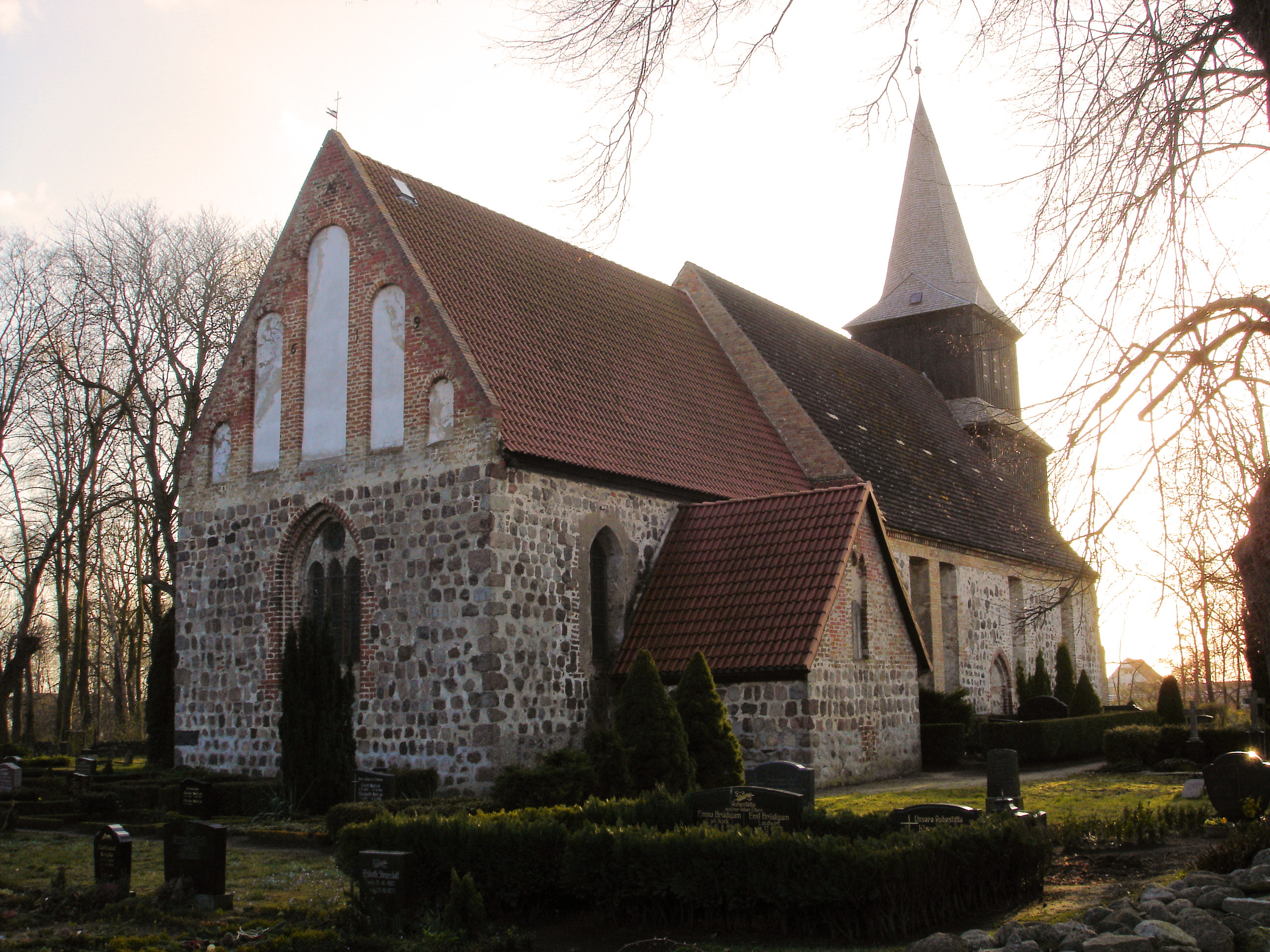 Kirche Blankenhagen / Church in Blankenhagen